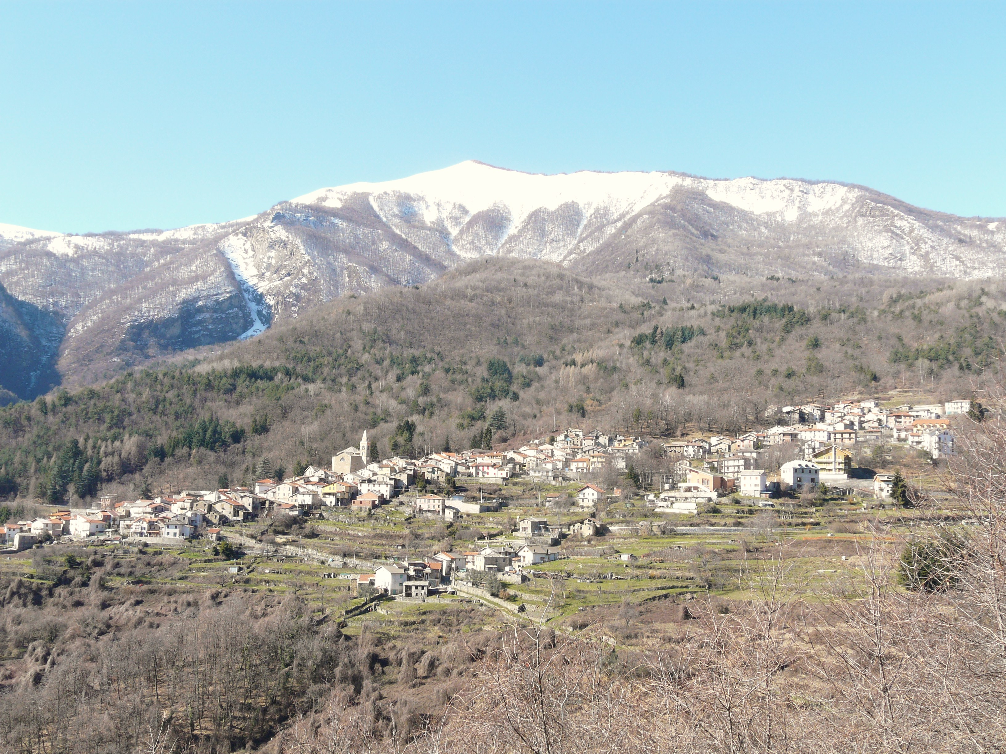 Mendatica, Liguria, Italia